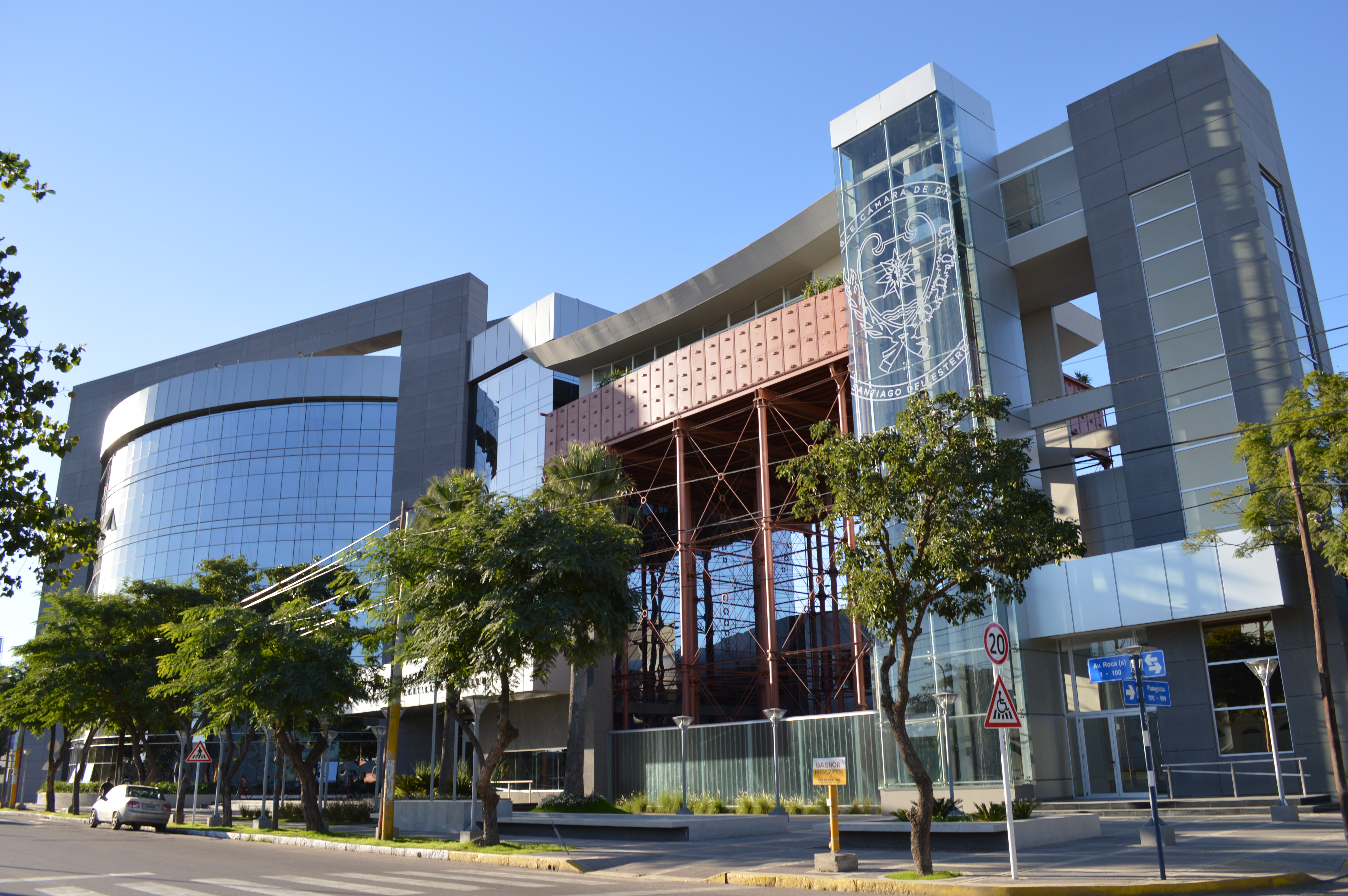 Nuevo Edificio del Poder Legislativo de la Provincia de Santiago del Estero, Argentina.